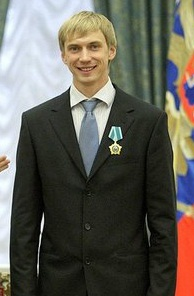 Андрей Сильнов